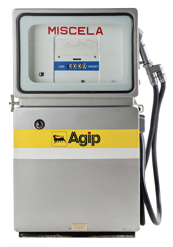 Distributore Nuovo Pignone This is a photo of a monument which is part of cultural heritage of Italy.